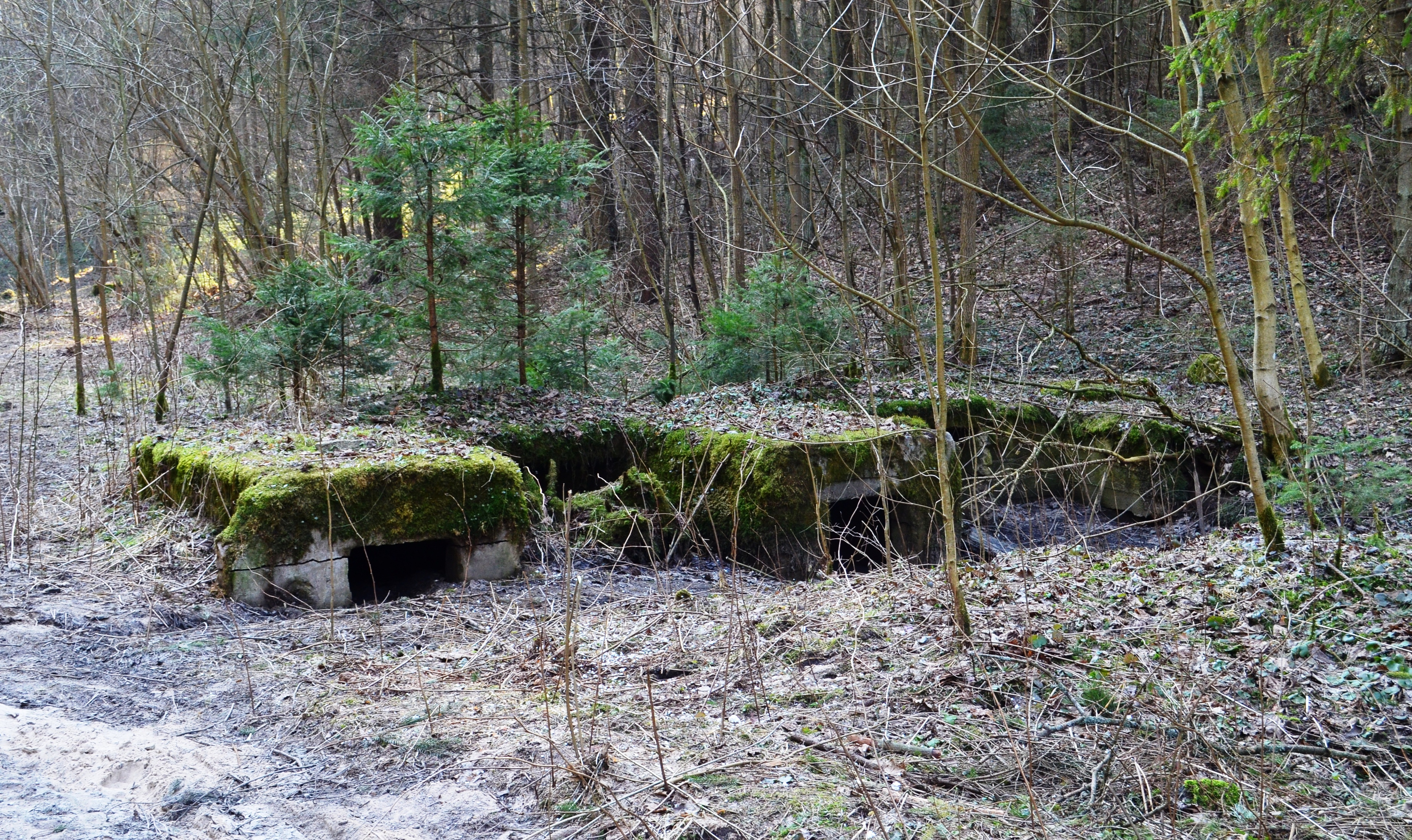 Karinių įtvirtinimų liekanos Ancučių draustinyje, Vilnius